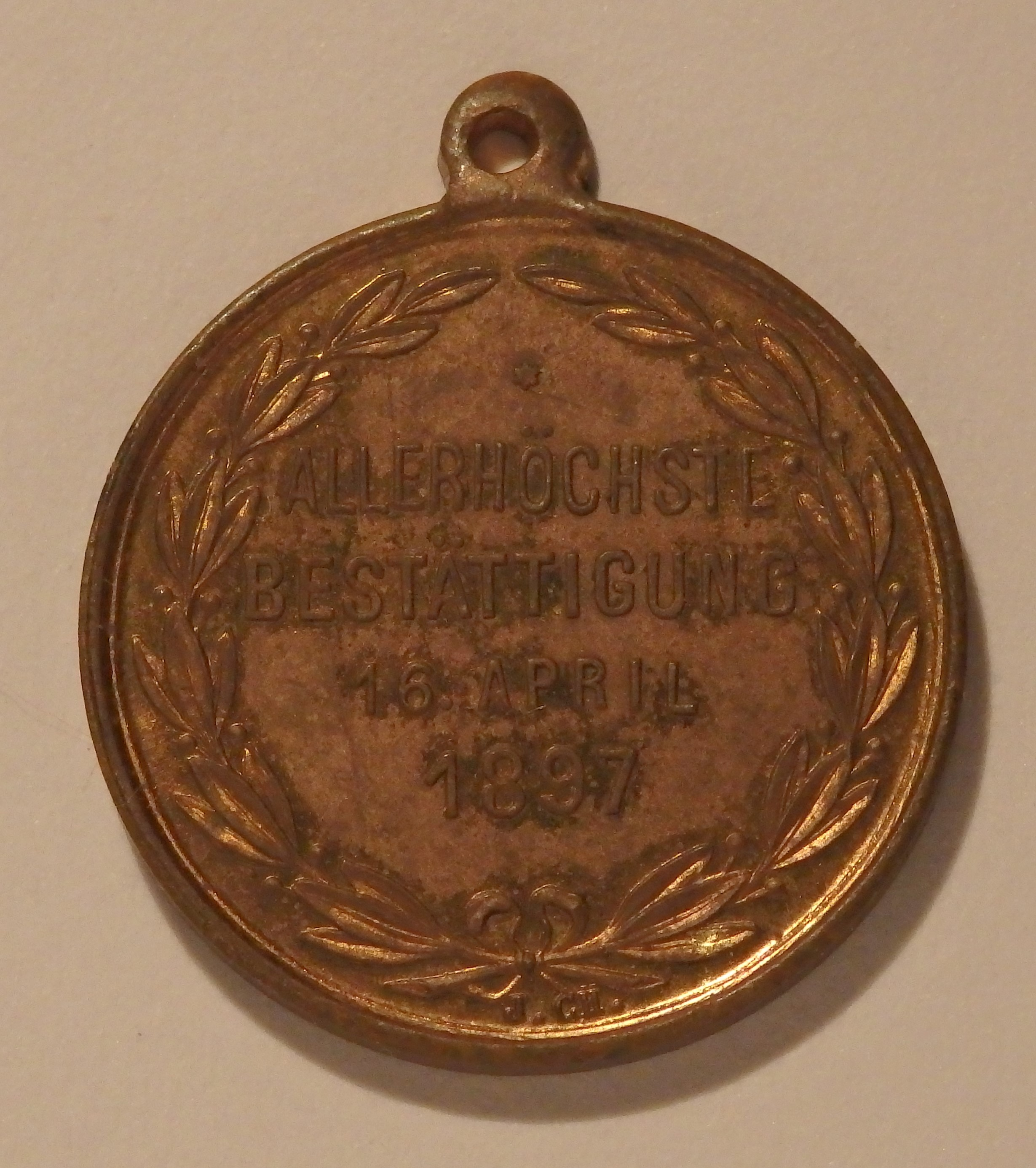 Rückseite der Medaille